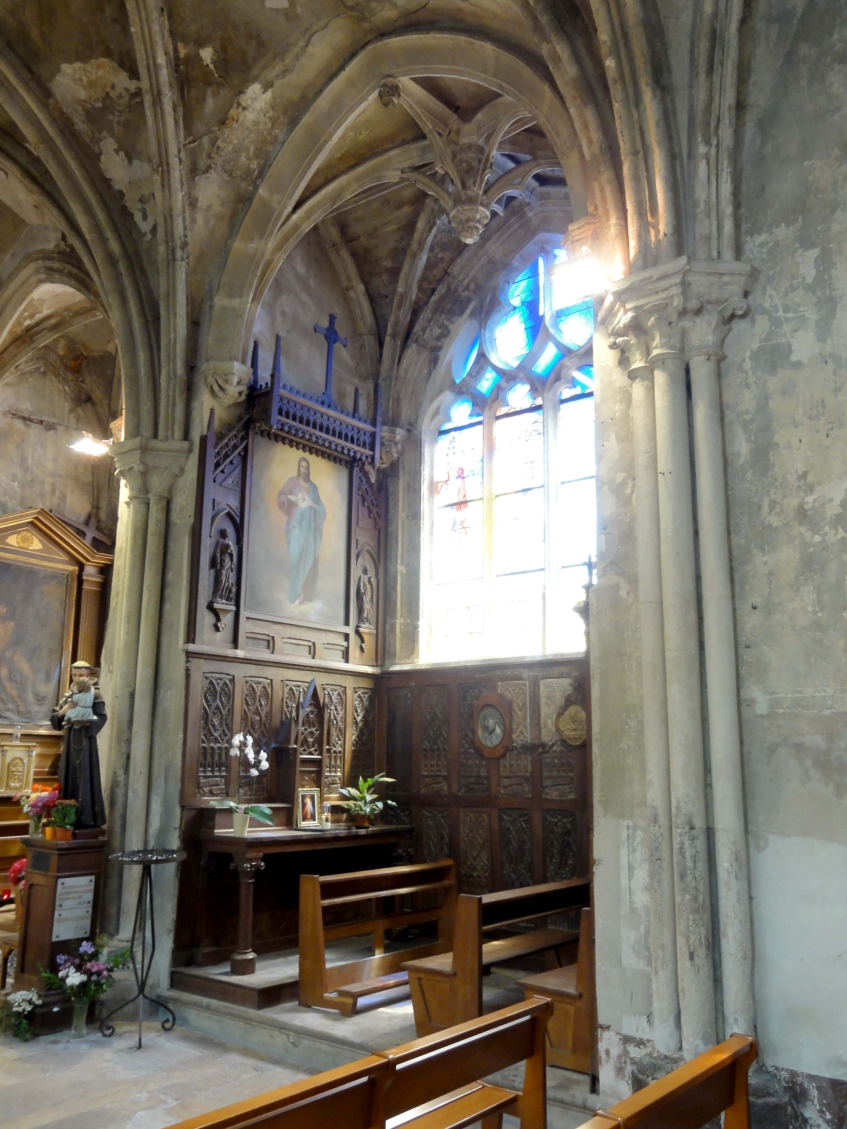 Voir titre.